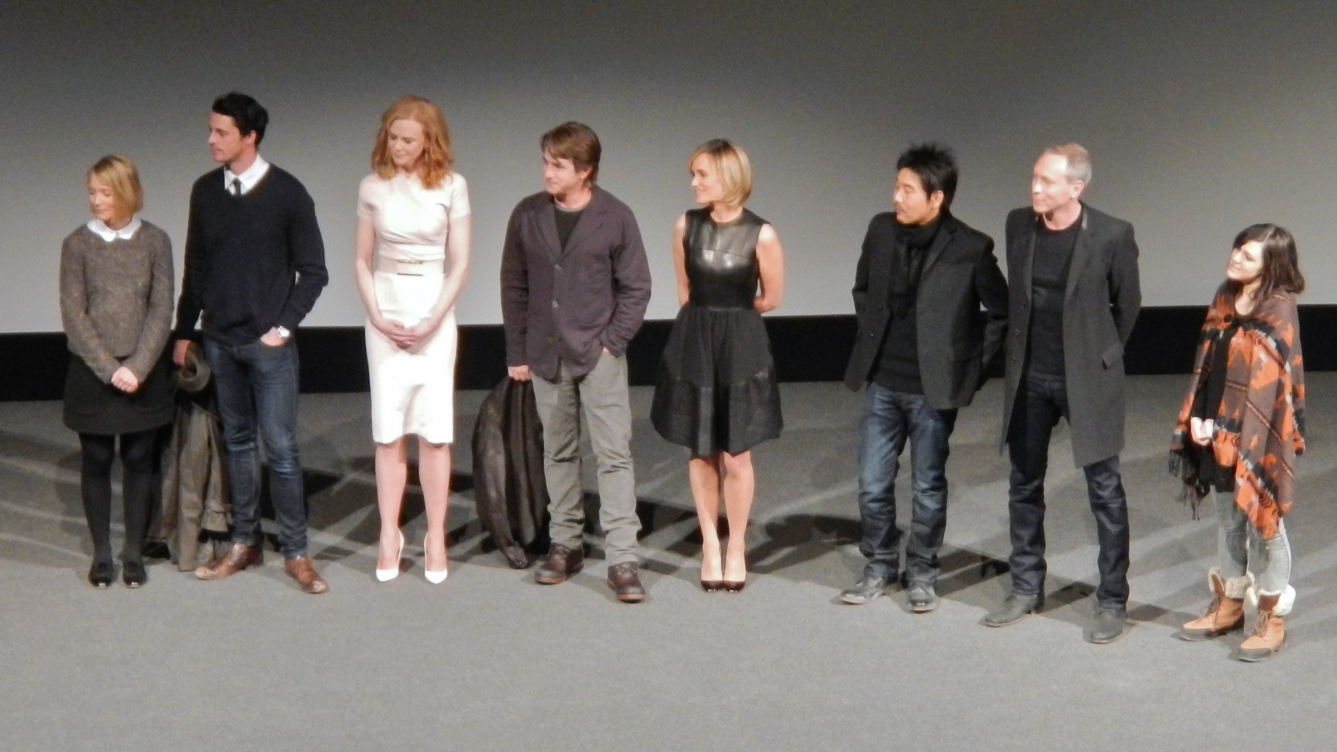 El elenco y el equipo realizador de la película Stoker (Lazos perversos) en el Festival de Cine de Sundance 2013.